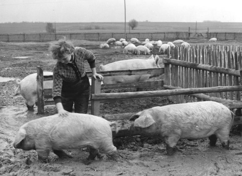 Diepensee, Bäuerin mit Schweinen im Außengehege Zentralbild Zühlsdorf 29.12.1959 VEG Tierzucht Diepensee hat den Plan übererfüllt. Das volkseigene Gut Diepensee im Bezirk Potsdam betreibt vorwiegend Tierzucht und liegt in der Schweinezucht im Bezirk Potsdam mit an der Spitze. Das Gut verfügt über 34 Zuchtsauen und 4 Stammeber. Die Zucht liegt in den Händen des Verdienten Aktivisten, Schweine-Zuchtmeister Wilhelm Jäkel. Es wird das Veredelte Landschwein und das Deutsche Edelschwein gezüchtet. Das Volksgut errang im Jahre 1958 auf der Landwirtschaftsausstellung in Markkleeberg 5 Gold- und 1 Silbermedaille. Darüberhinaus erhielten die Diepenauer mehrere 1. und 2. Preise auf Eliteschauen und Absatzveranstaltungen. Das Gut besitzt 2500 Schweine, davon ca. 400 in der Zuchtanstalt. Die Kollegen des volkseigenen Gutes haben ihren Schweinezuchtplan mit 117, 6 S übererfüllt. Sie haben 1959 bei 18 Ferkeln pro Sau 17, 2 Ferkel aufgezogen. UBz: Anneliese Westphal, die bisher als Landarbeiterin auf dem Volksgut gearbeitet hat, wurde Mitglied der Schweinezuchtbrigade. Sie will sich auf dem Gebiet der Tierzucht weiter qualifizieren. Hier betreut sie die Zuchtsauen in ihrem Auslauf.